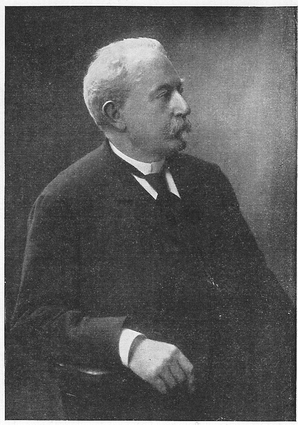 Photo de Charles-Maurice Cabart Danneville vers 1910